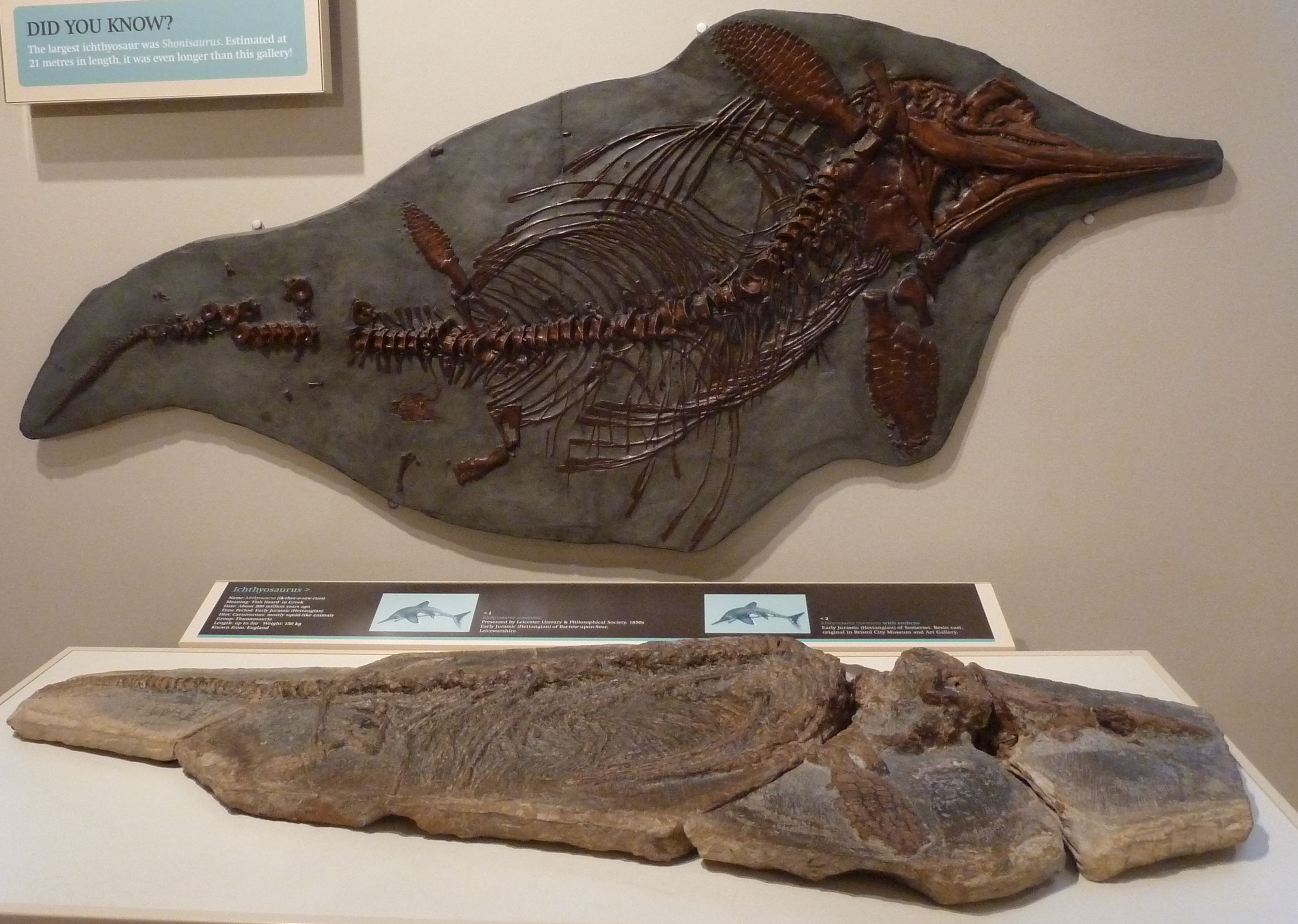 Ichthyosaur fossils, New Walk Museum, Leicester.